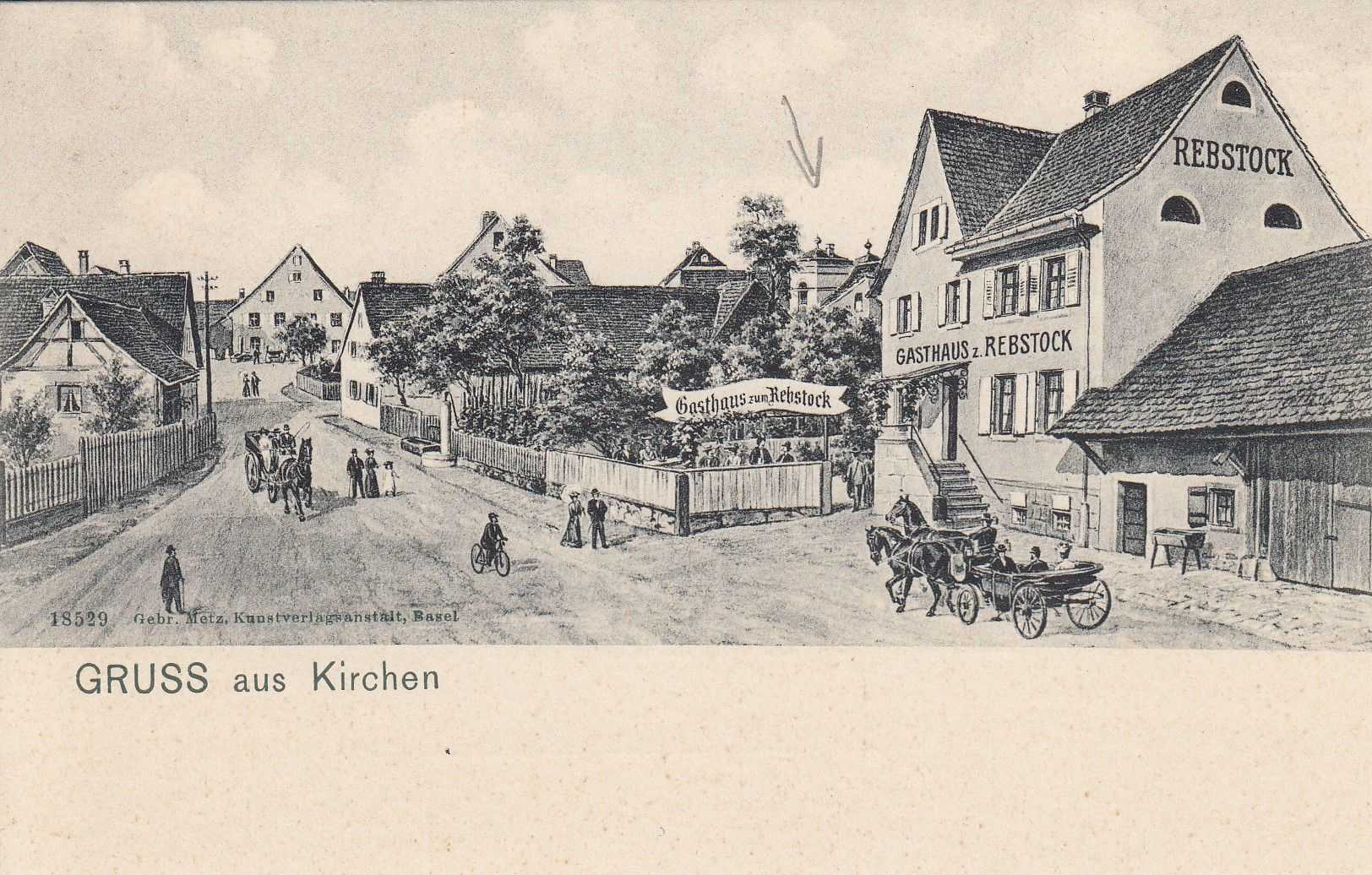 Ansichtskarte von Kirchen mit Synagoge